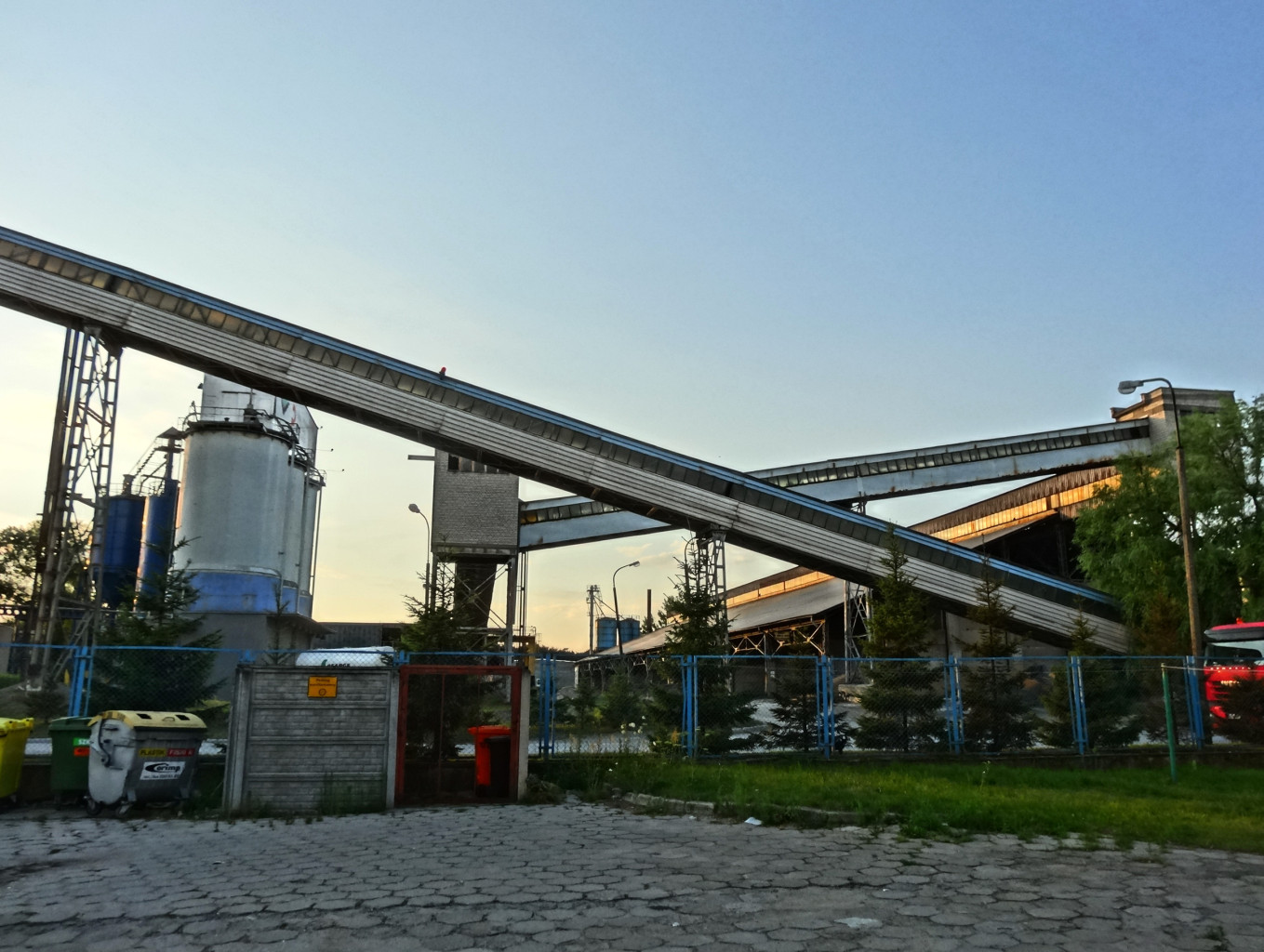 Przedsiębiorstwo "PREFABET-BIAŁE BŁOTA" S.A. w Białych Błotach k. Bydgoszczy, powiat bydgoski